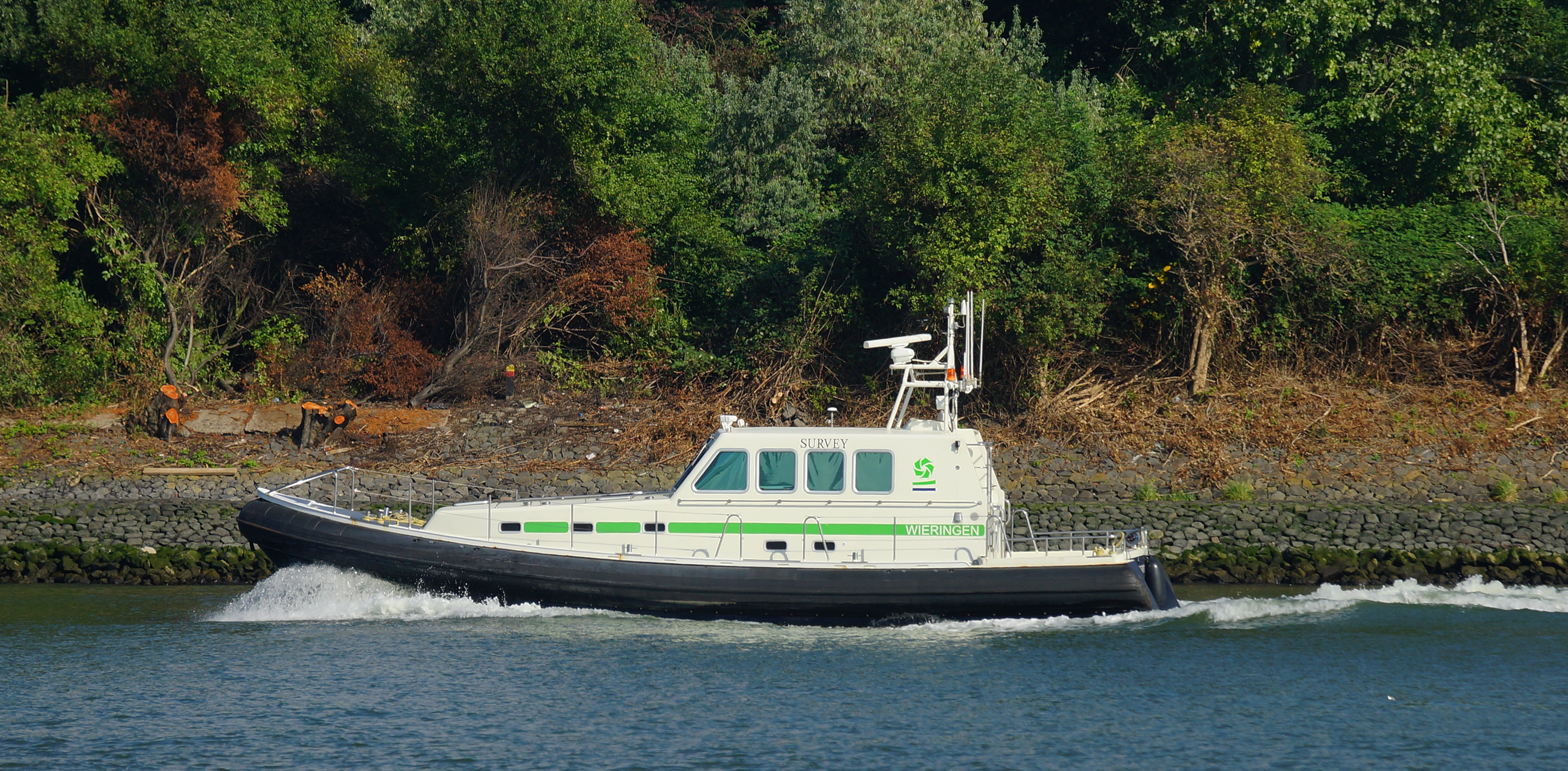 Nieuwe Maas t.h.v Schiedam 18-9-2016